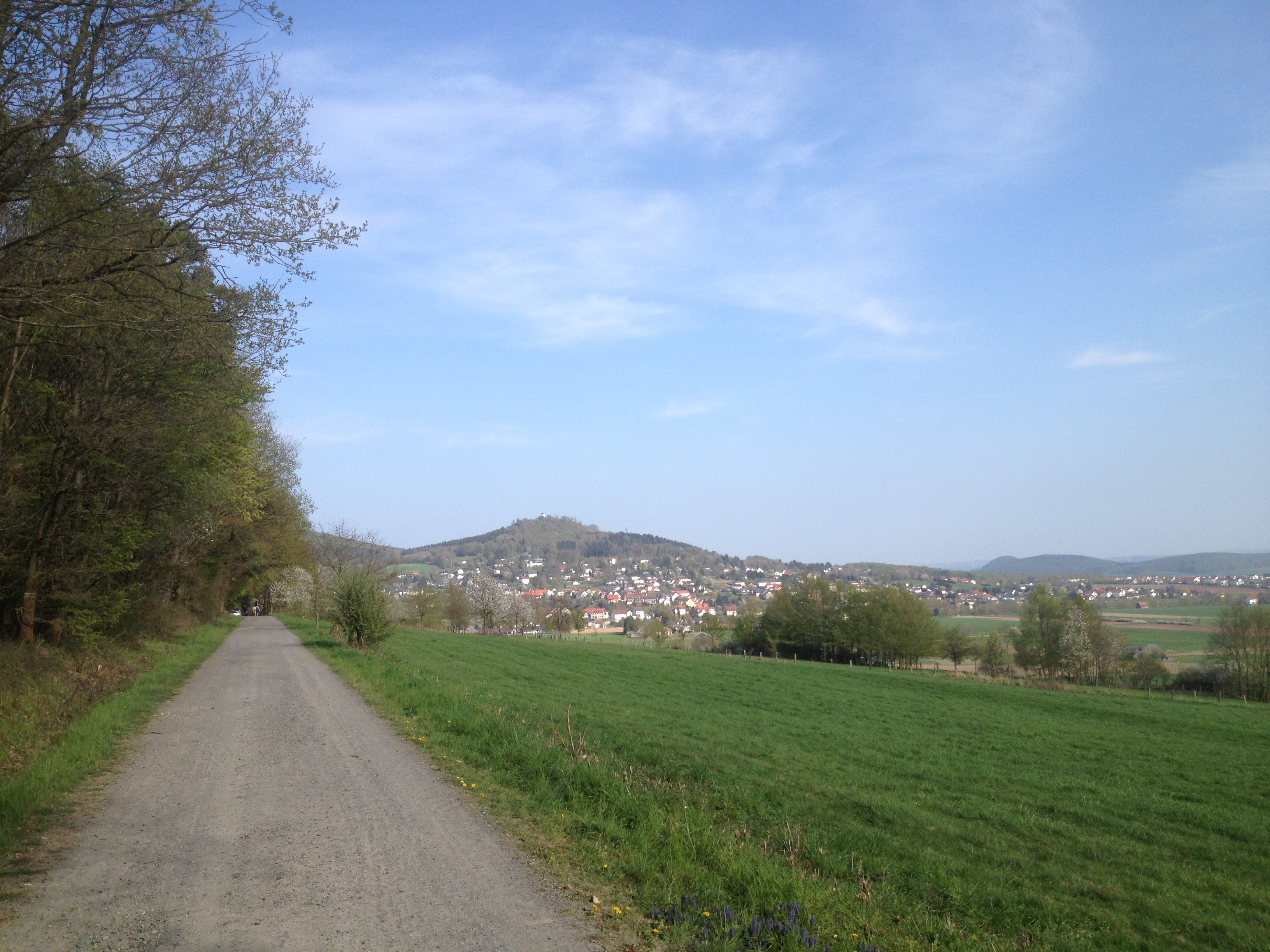 Verschiedene Wanderwege, darunter der Habichtswaldsteig und der Ederseeweg, südlich der Altenburg mit Blick auf Niedenstein